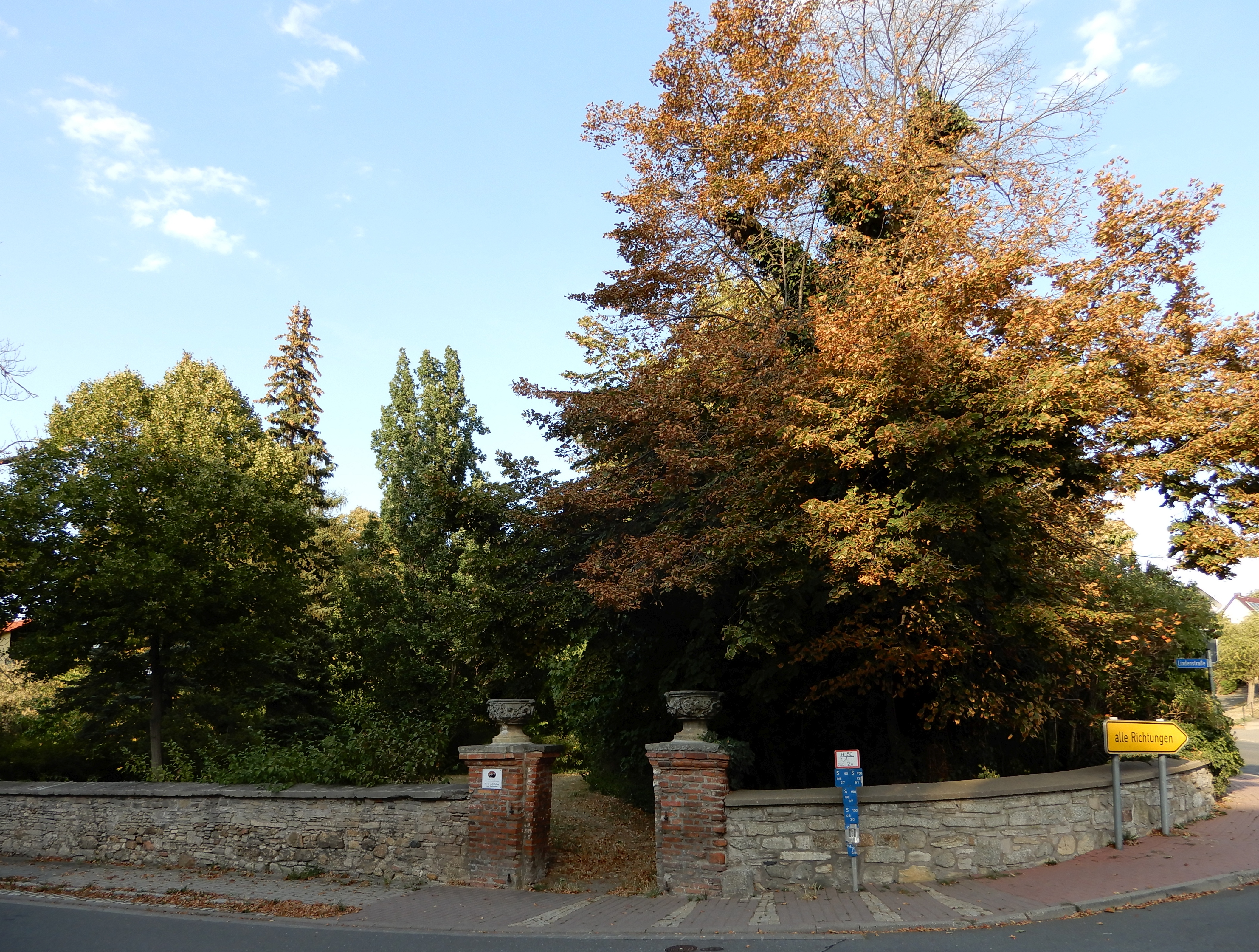 Park mit Nathusius-Grabstelle (Neinstedt)